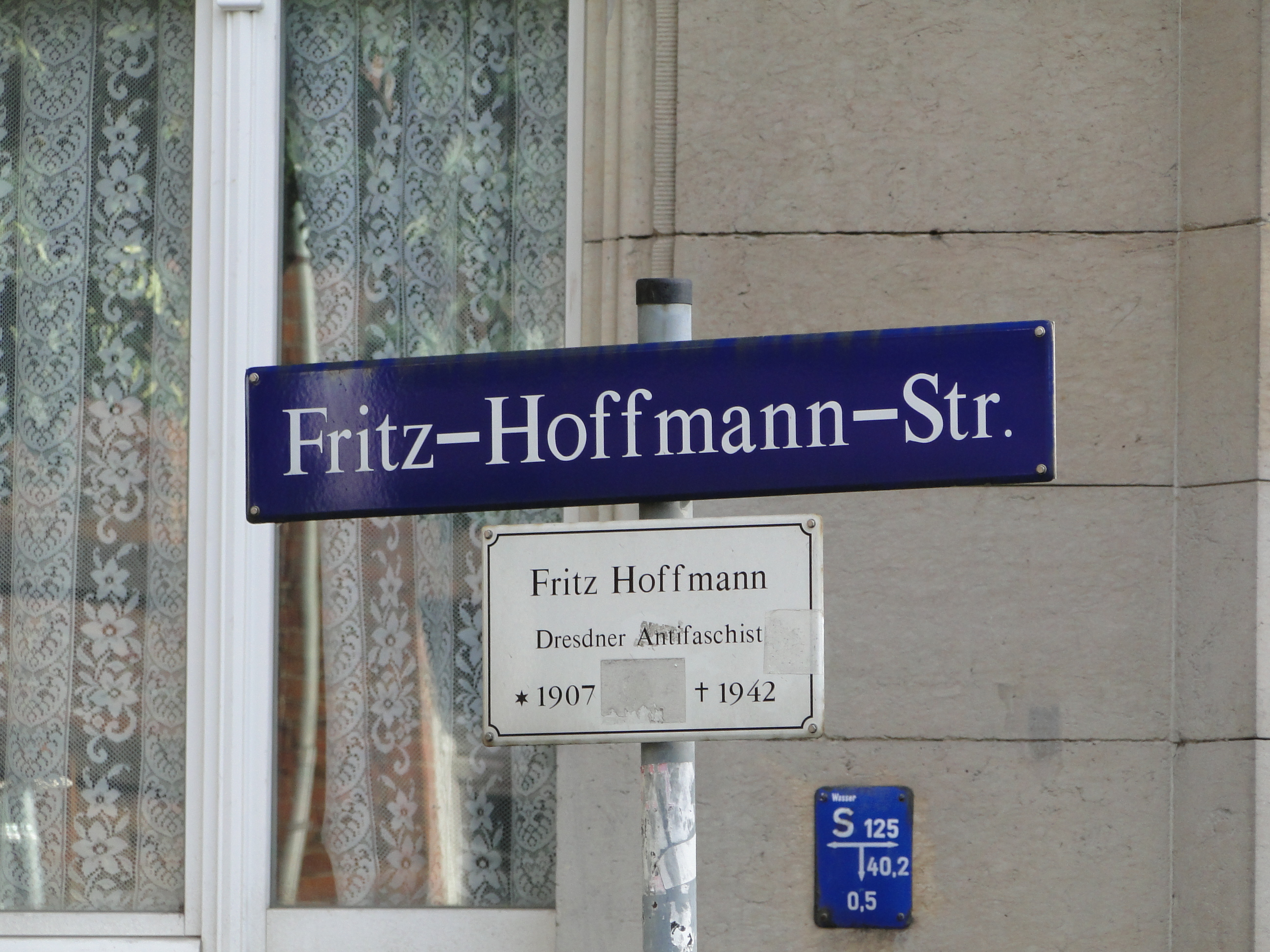 Fritz-Hoffmann-Straße in Dresden, Straßenschild mit Erklärtafel